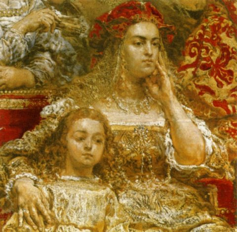 Królowa Bona (fragment obrazu Zawieszenie dzwonu Zygmunta)